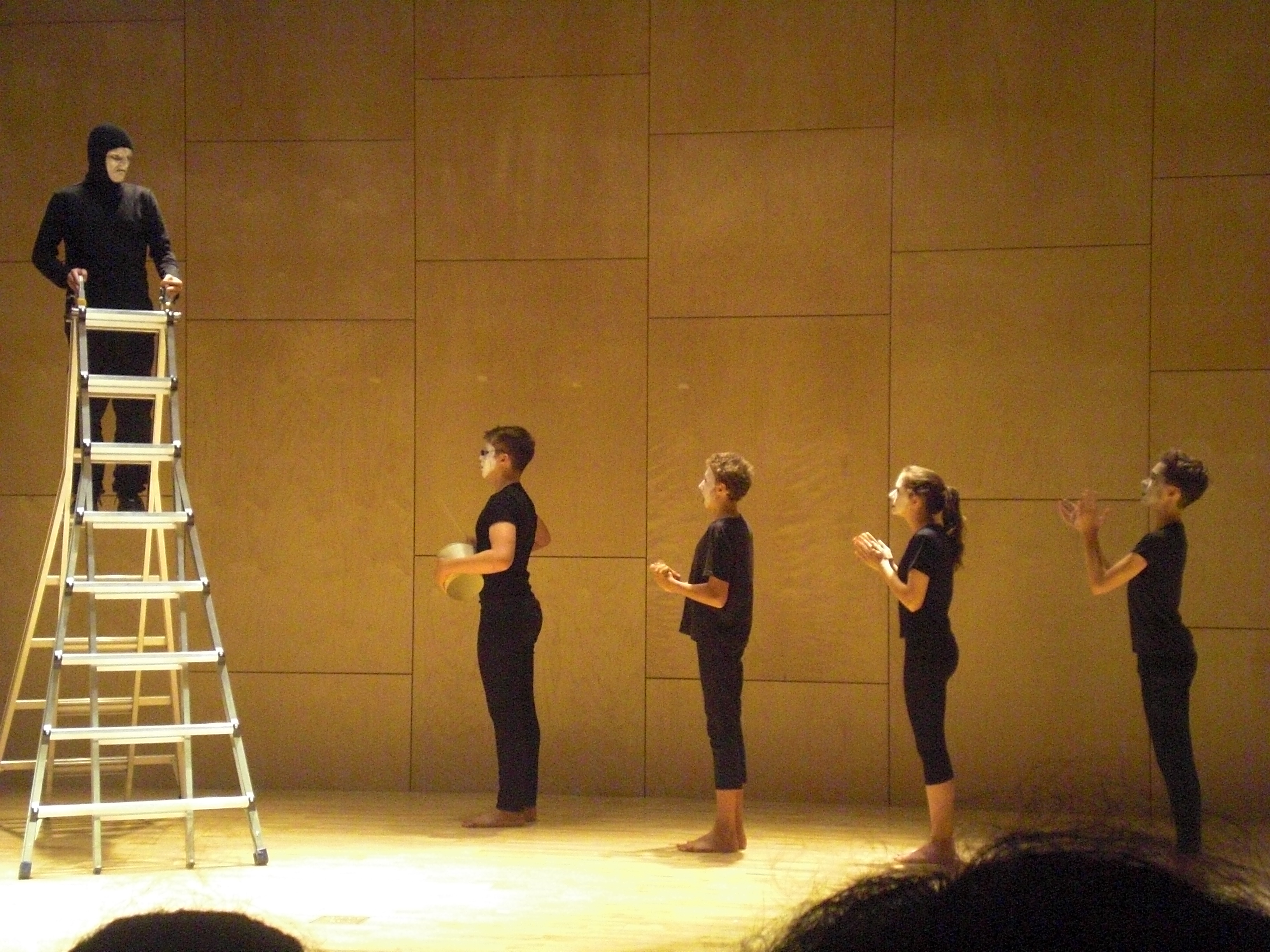 El la vivo de insektoj en UKo 2017